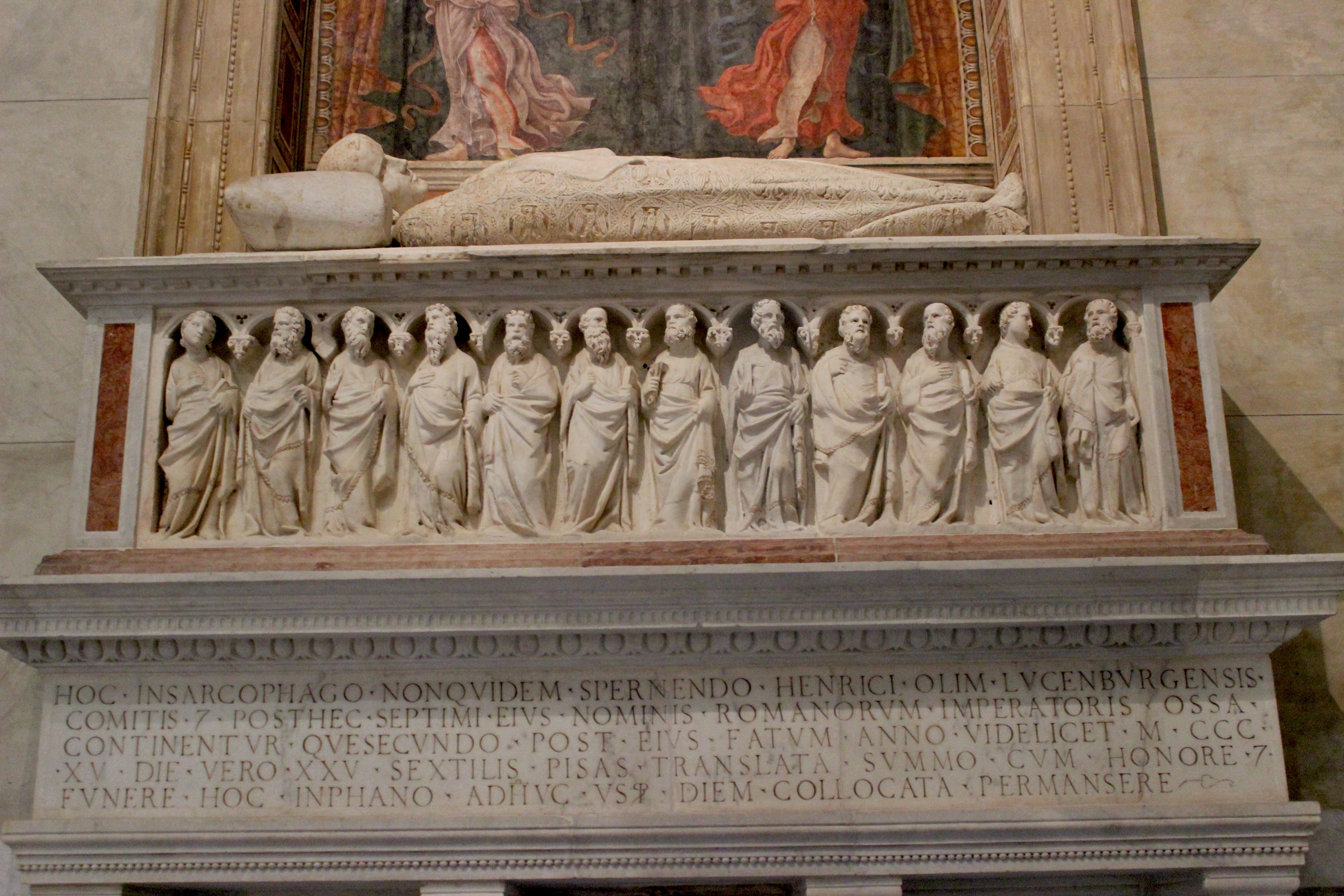 Tumba de Enrique VII. Catedral de Pisa.